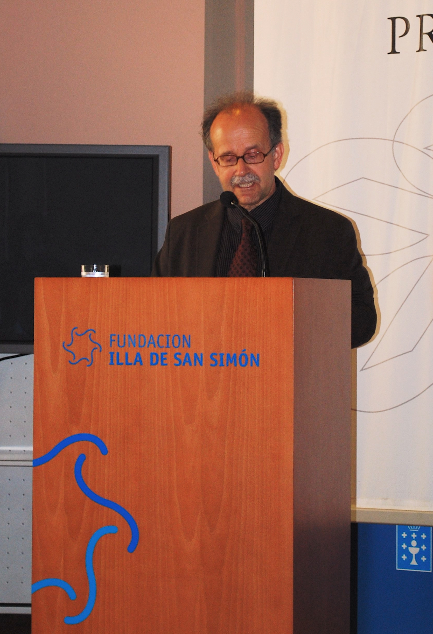 Agustín Fernández Paz pronunciando o discurso Oito doas para San Simón na Illa de San Simón con motivo da celebración do ditame dos XXVIº Premios Xerais o 6 de xuño de 2009.